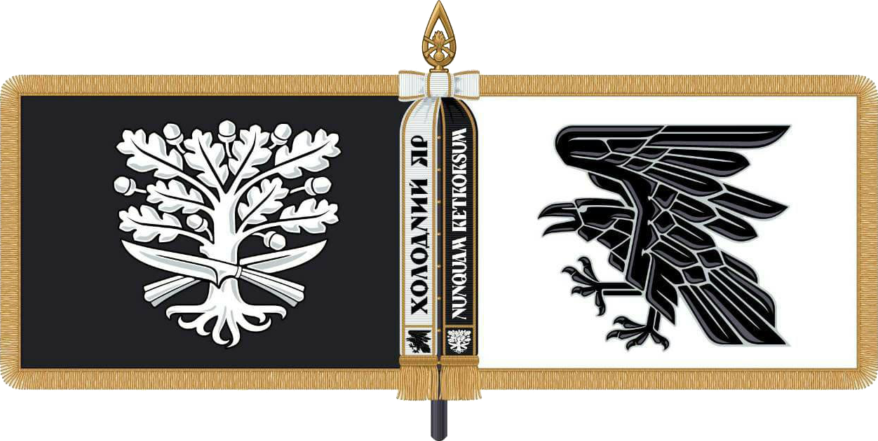 Бойове знамено, 93-тя окрема механізована бригада Холодний Яр